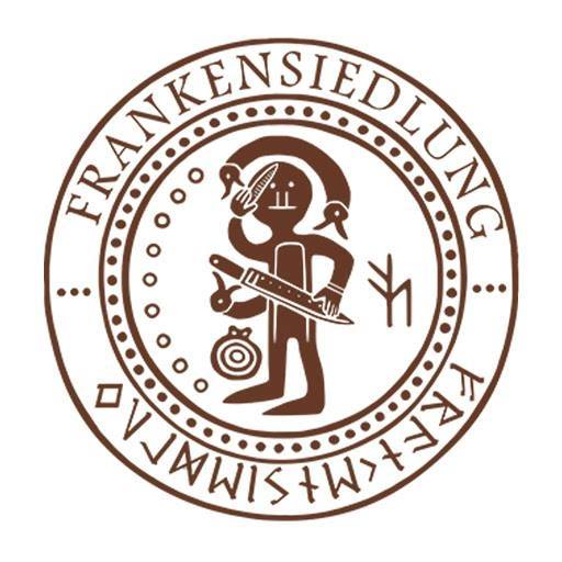 Logo Grabstele Oberdollendorf